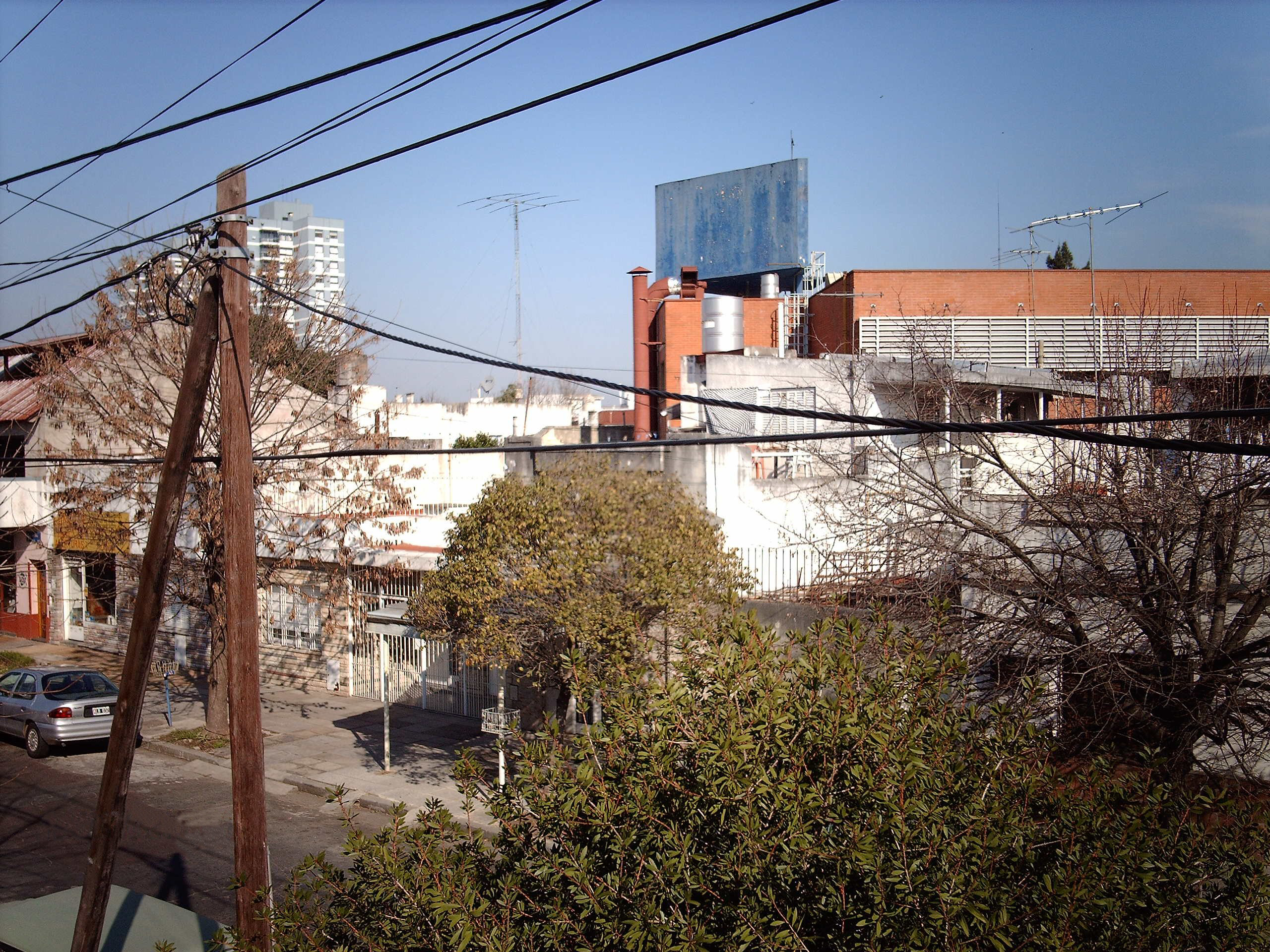 Villa Real, Ciudad Autónoma de Buenos Aires, Argentina.